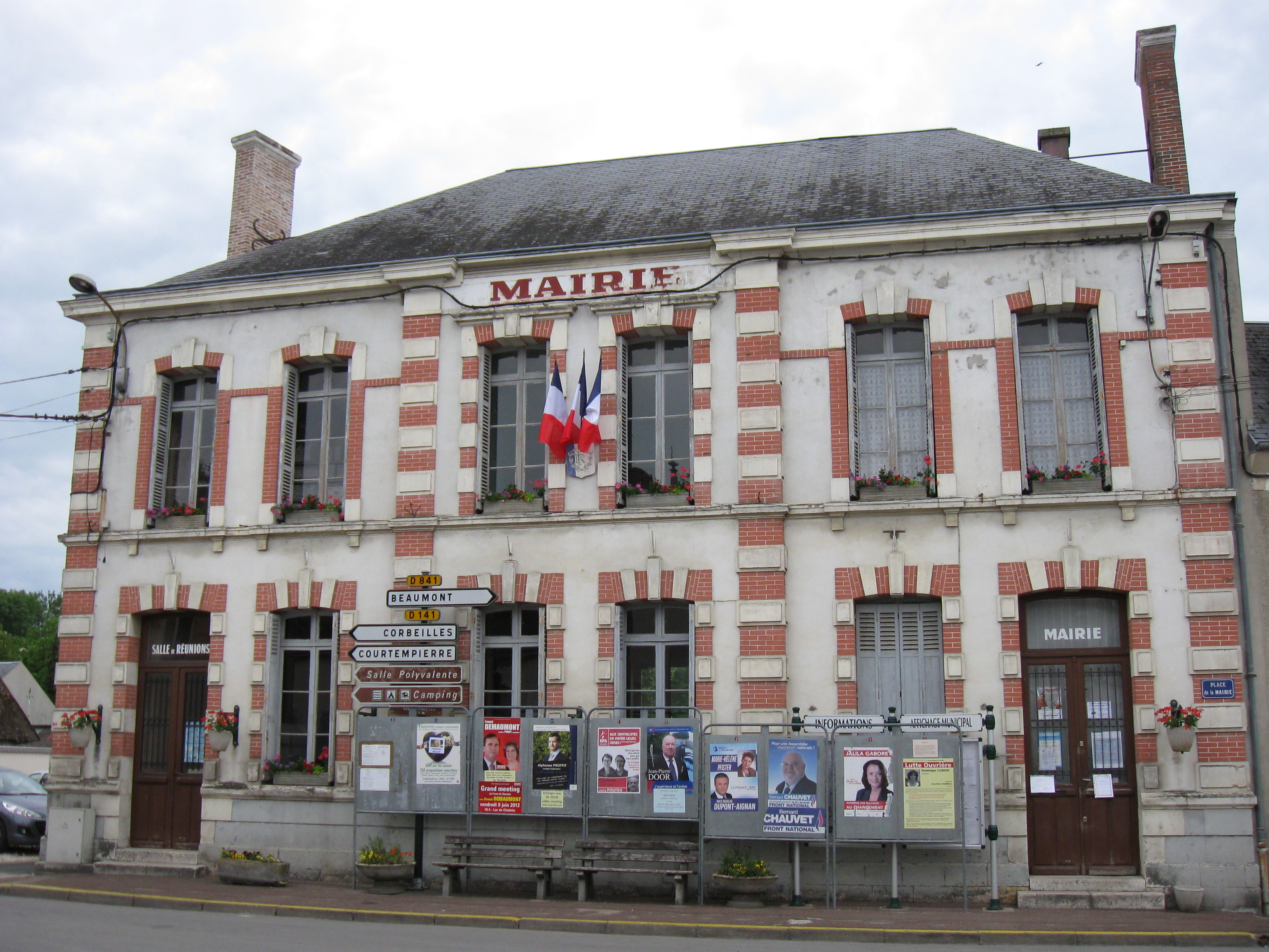 Mairie de Sceaux-du-Gâtinais. (département du Loiret , région Centre).